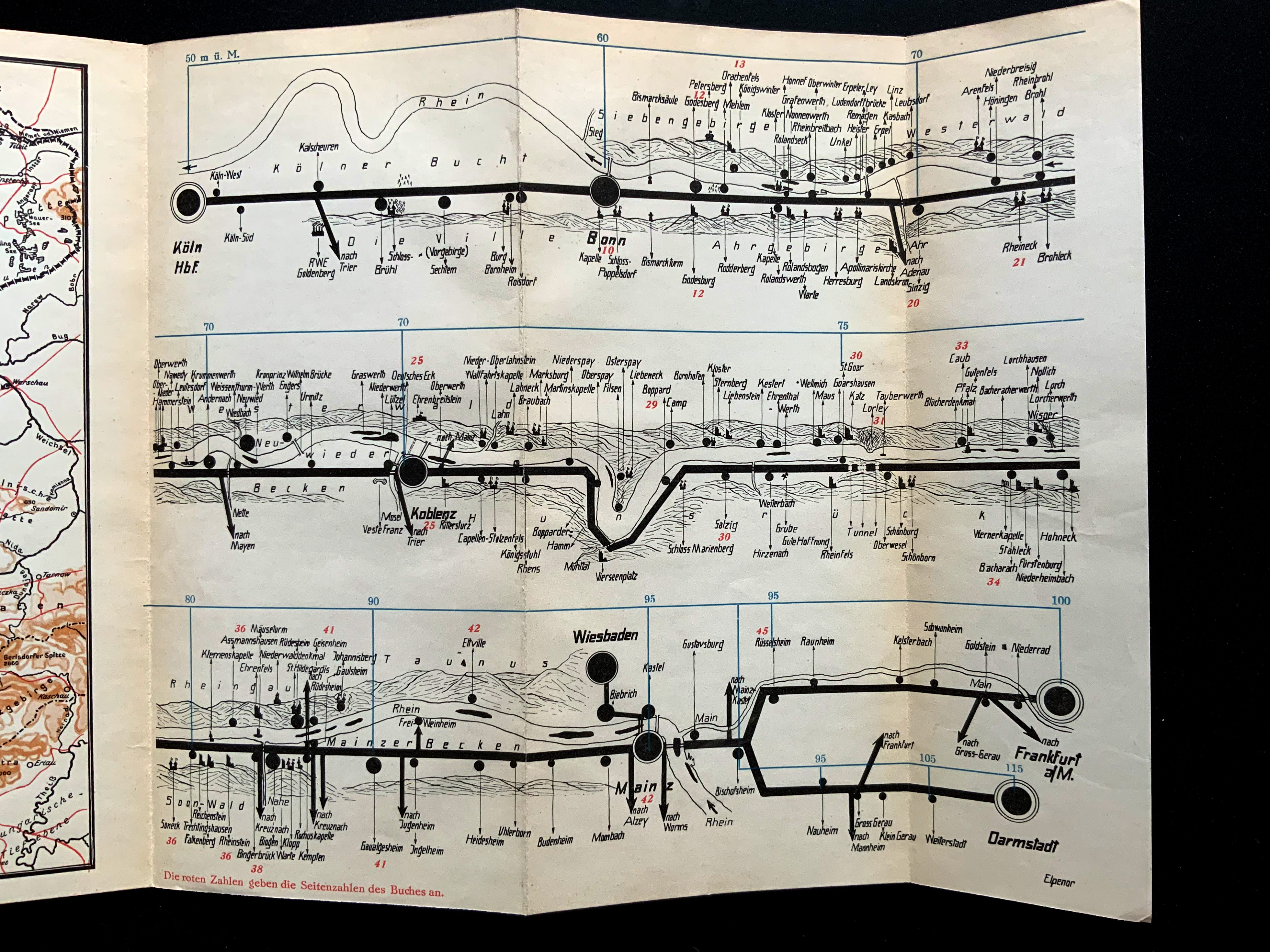 Beiderseits vom Schienenweg – Rheintrasse